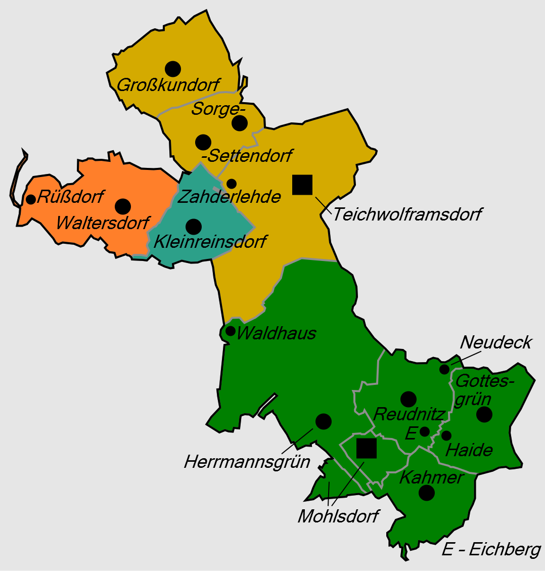 Gliederung der Gemeinde Mohlsdorf-Teichwolframsdorf ab 22. März 1994